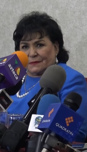 ¿Carmen Salinas es amiga de los papás de Donald Trump? regañan a Edith González x enseñar calzones